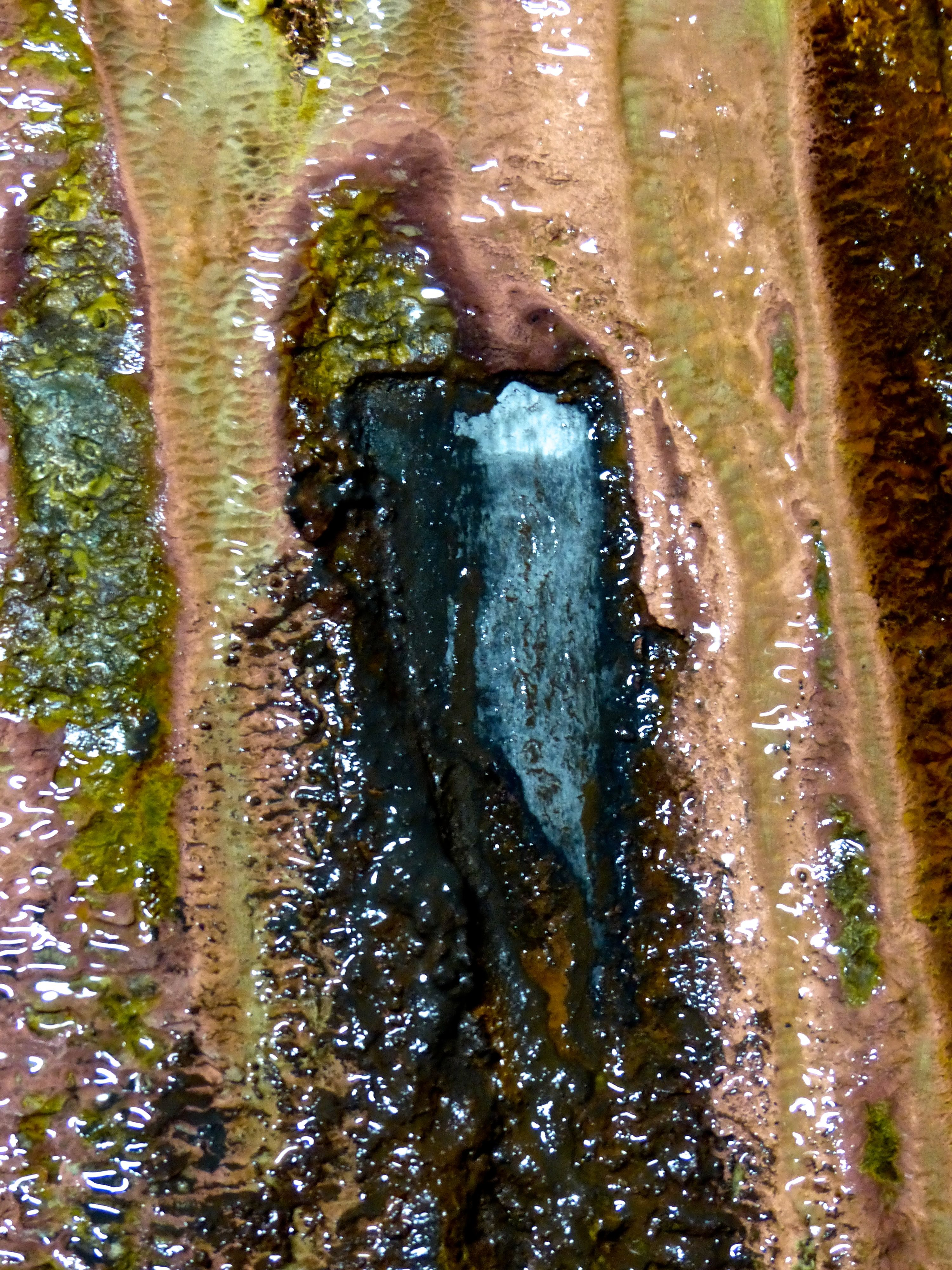 Kilianstollen:Bildung von Zementkupfer über Eisenplatten (Detail)